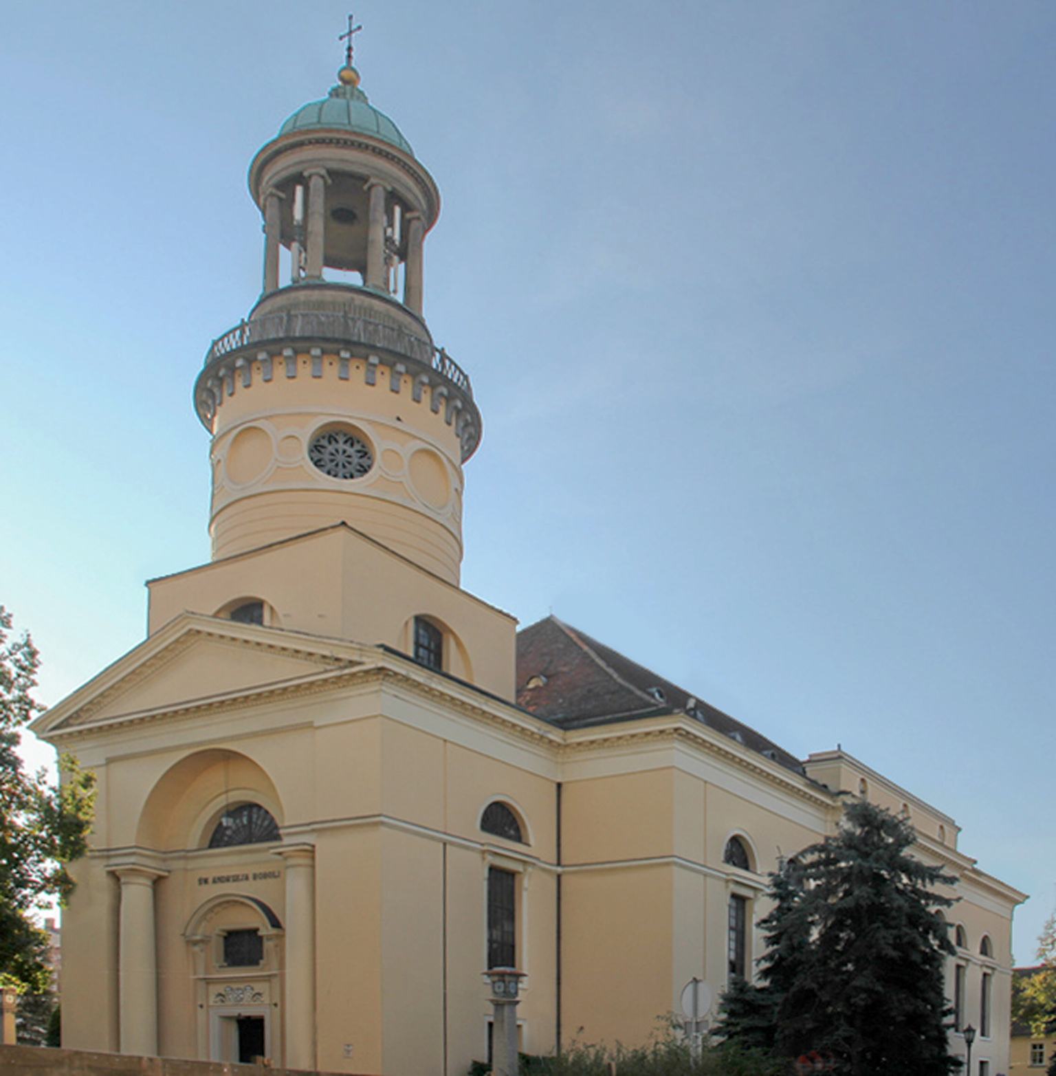 St. Andrew Bobola church in Rawicz, Poland